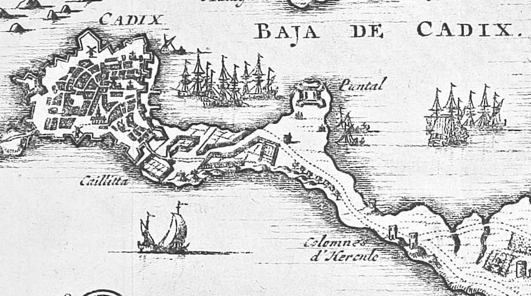 Cadiz e arredores (Don Juan Álvarez de Colmenar, 1715)